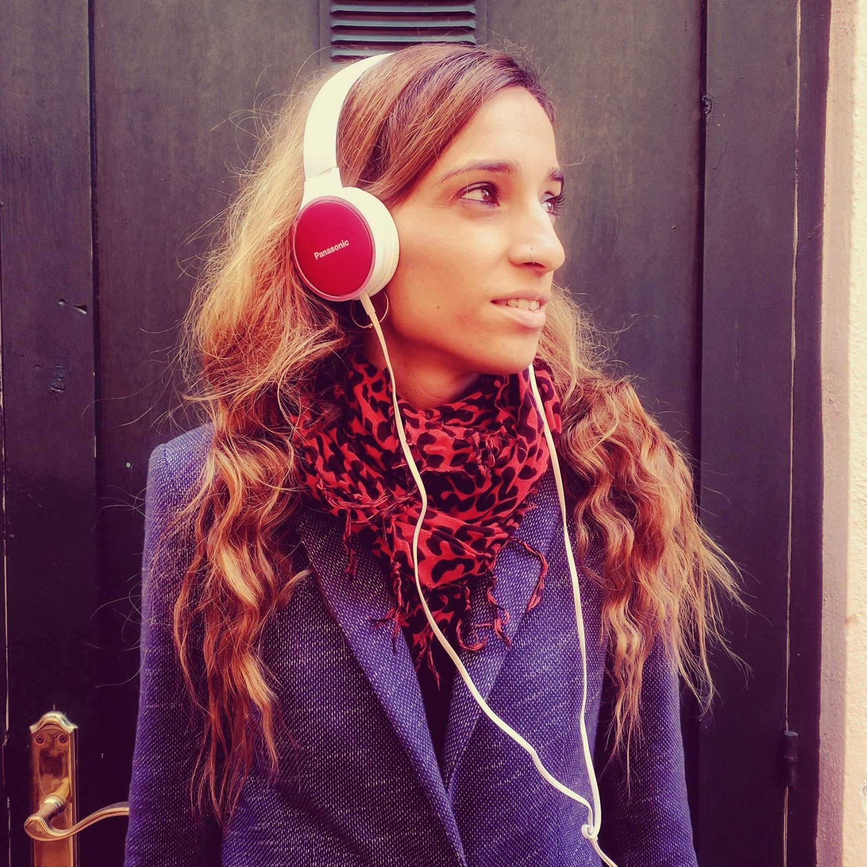 Ivette Nadal a Granollers